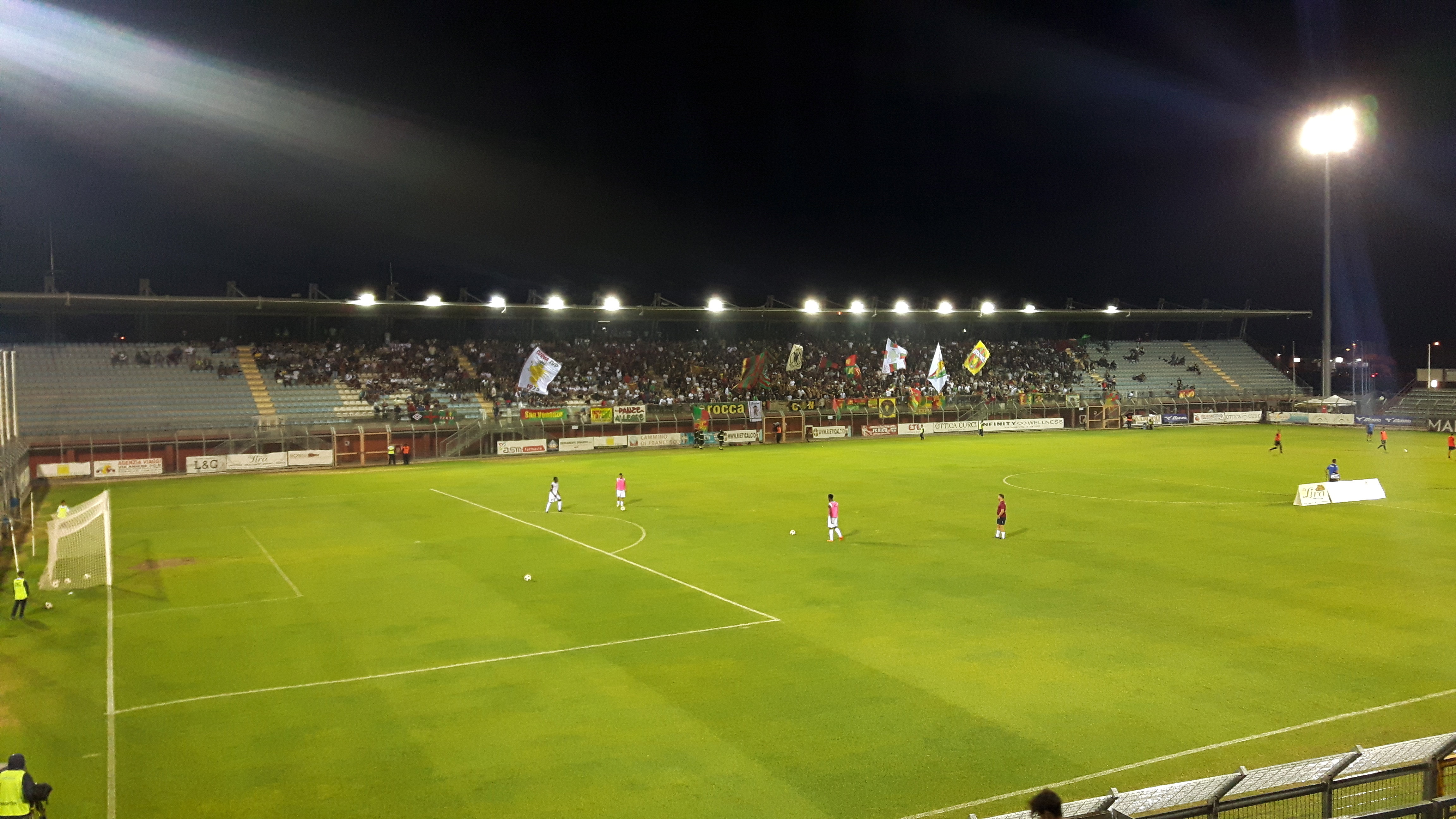 Lo stadio Centro d'Italia-Manlio Scopigno di Rieti fotografato dalla tribuna Vallesanta poco prima del calcio d'inizio della partita Rieti-Ternana del 24 agosto 2019, valevole per la prima giornata del campionato di serie C. È inquadrata la tribuna Terminillo, assiepata con la tifoseria della Ternana.